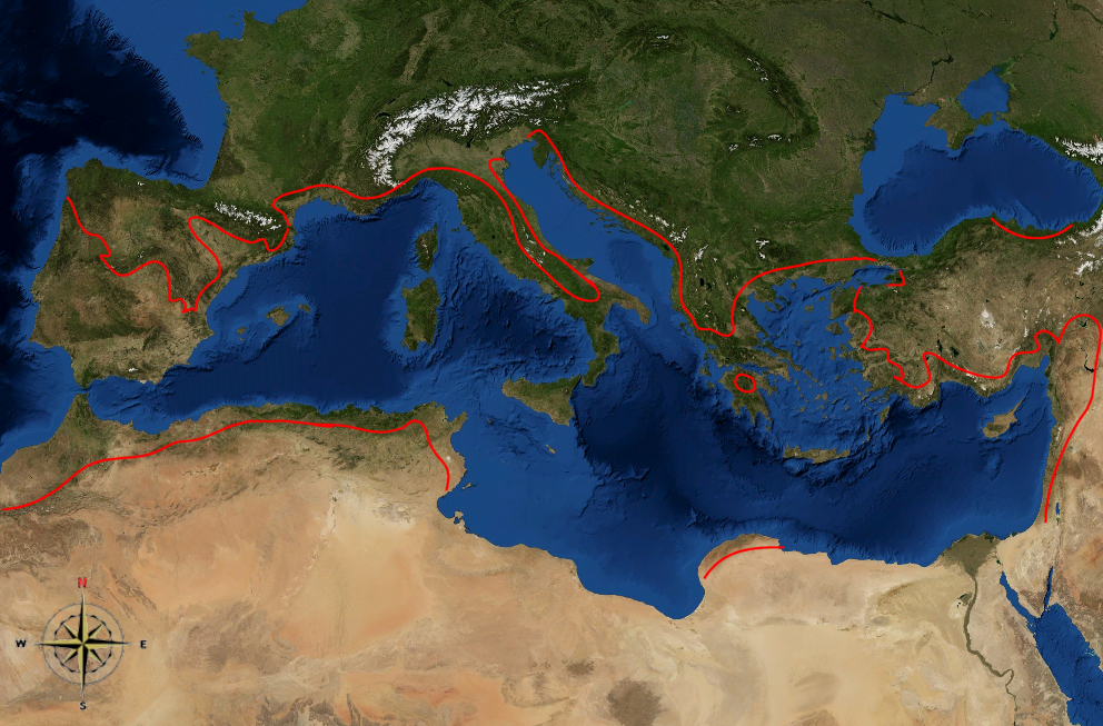 Verbreitungsgrenze des Ölbaumes in der Mittelmeerregion. Sonstiges: Die Grenzlinien per Hand nach Vorlage selbst eingefügt.